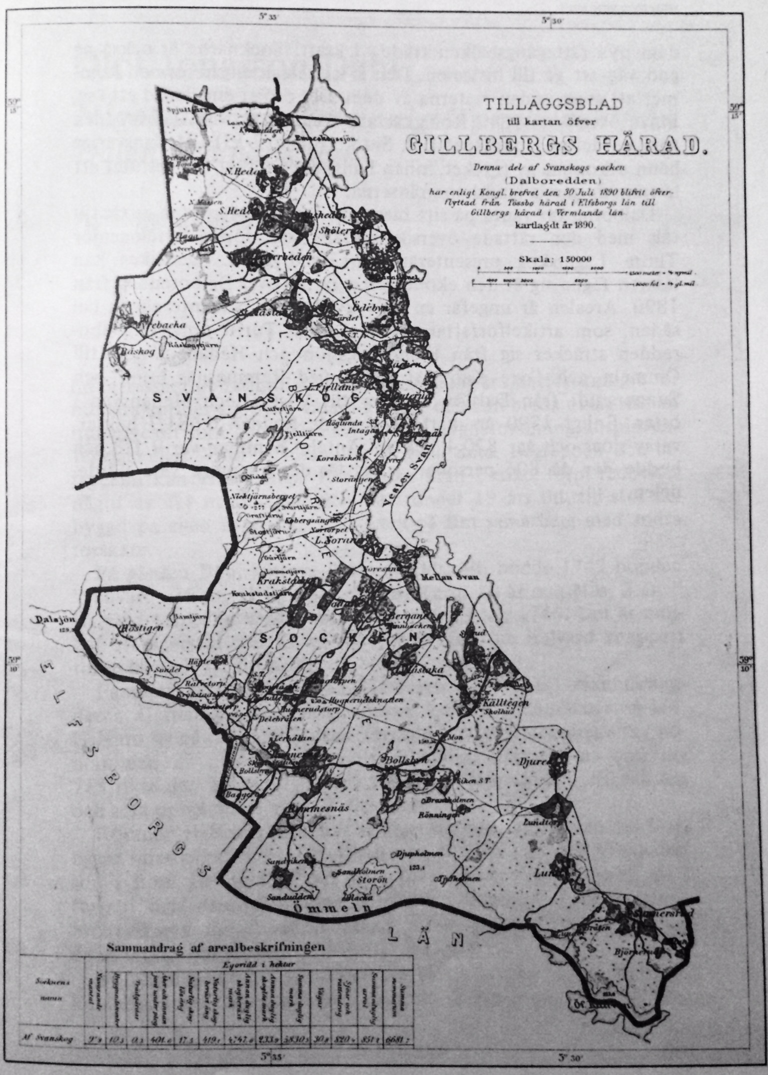 Tillägsblad till Gillbergs härad efter södra Dalboreddens överflyttning från Tössbo härad (Älvsborgs län) till Gillbergs härad (Värmlands län) enligt kungligt brev den 30 juli 1890.